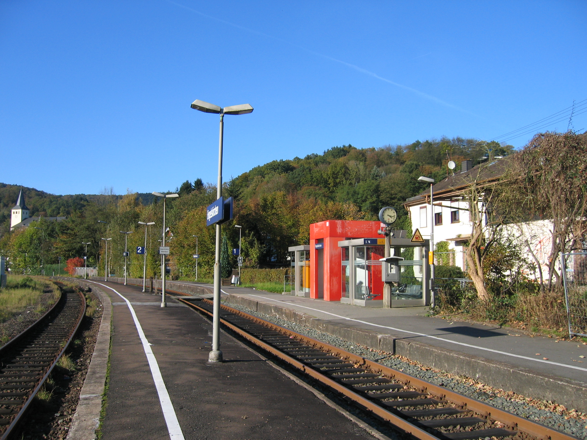 Bahnhof Engelskirchen an der Aggertalbahn